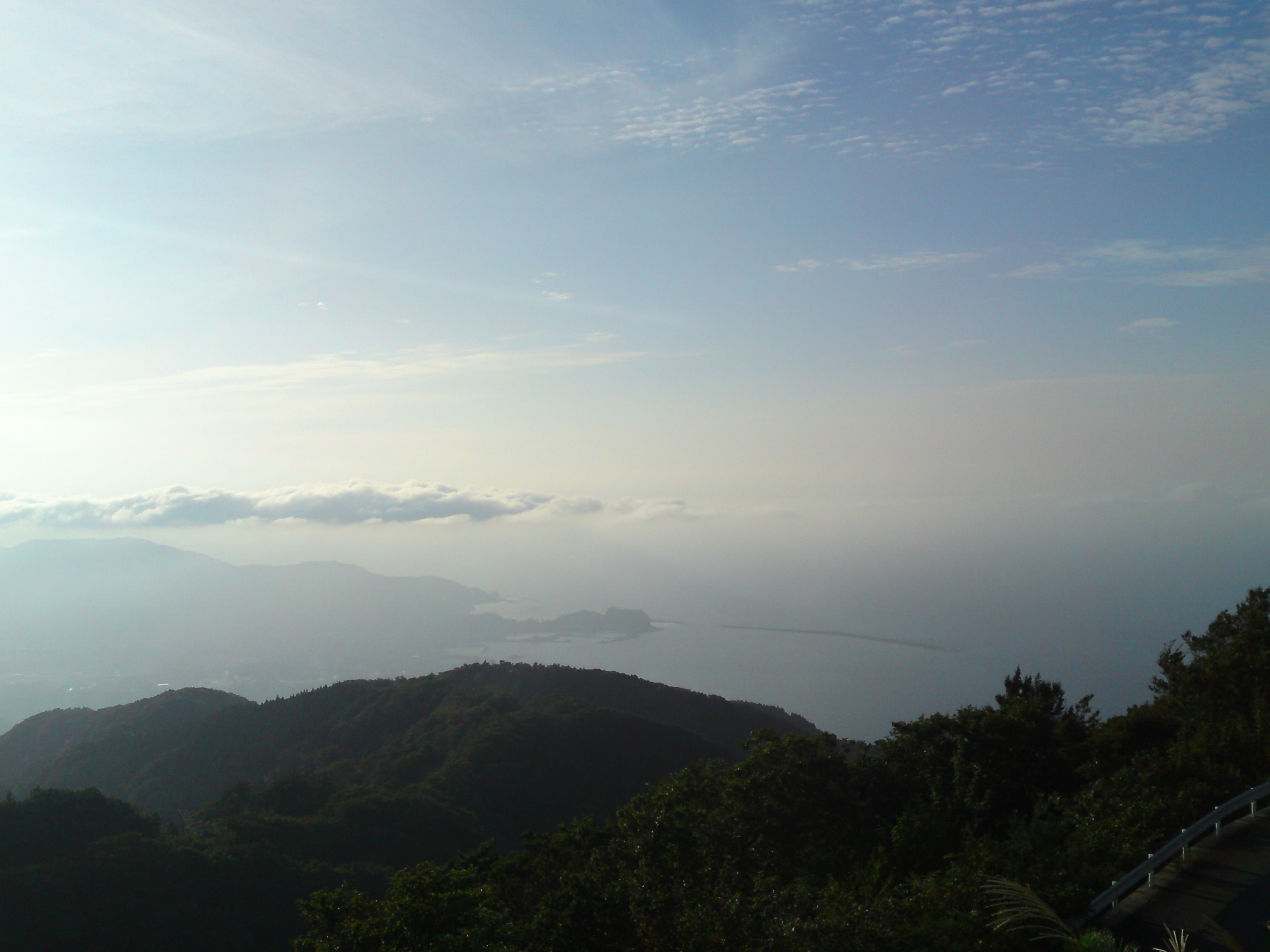 登山道より市街地方向